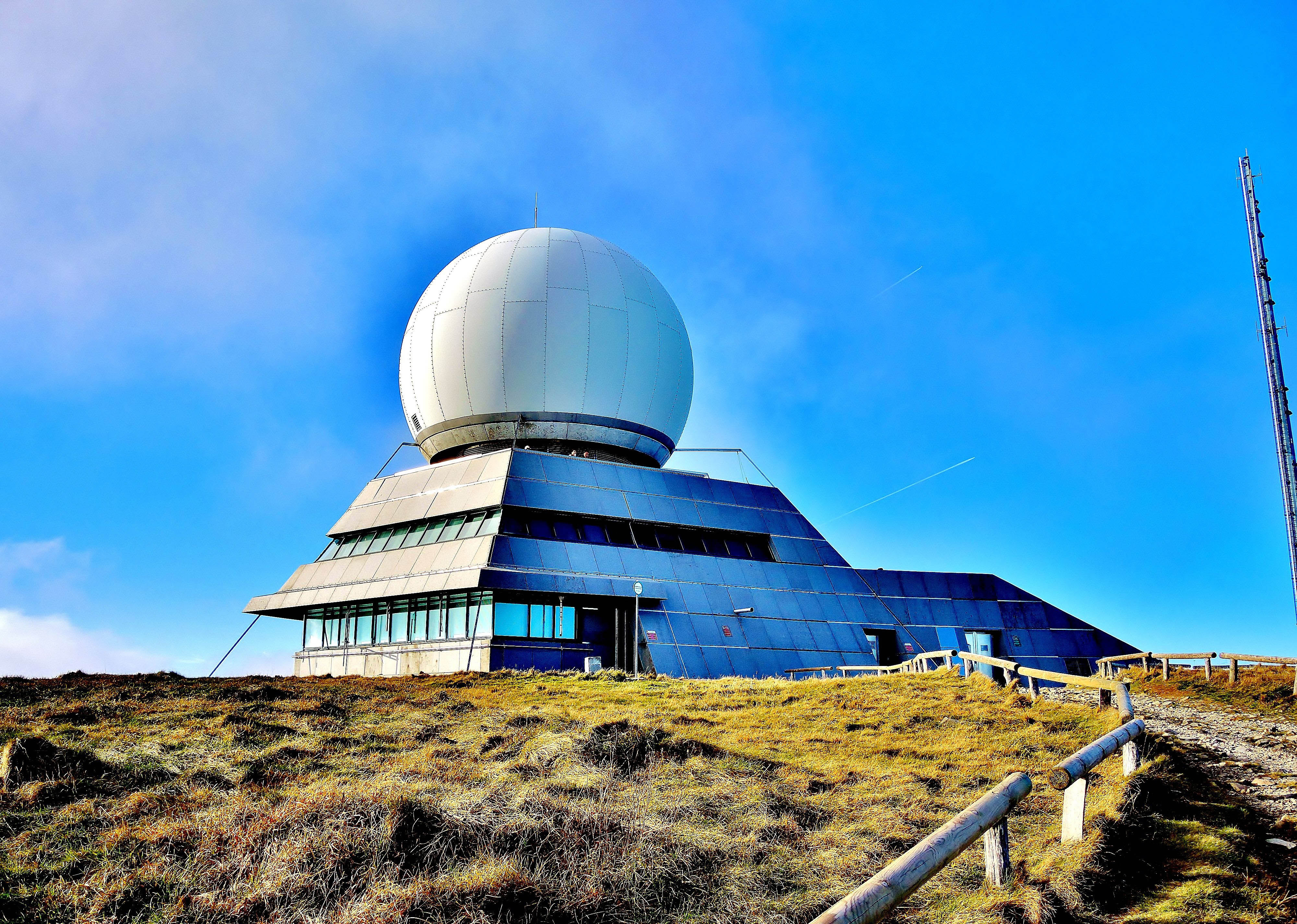 Le radar au sommet du grand ballon.